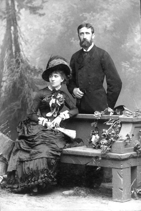 Herzöge von San Jaime.